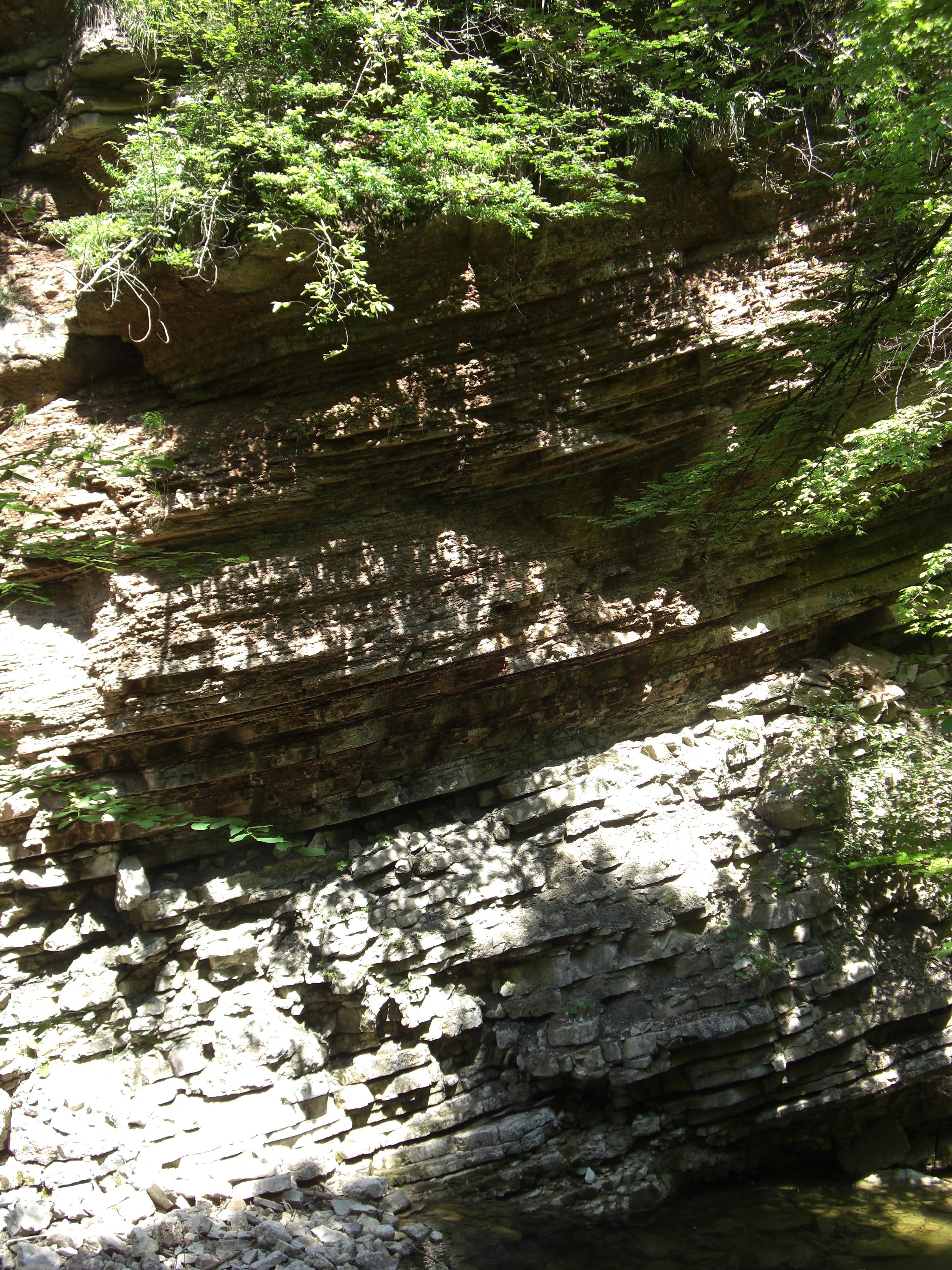 Roter Knollenkalk und grauer Hornsteinknollenkalk in der Glasenbachklamm